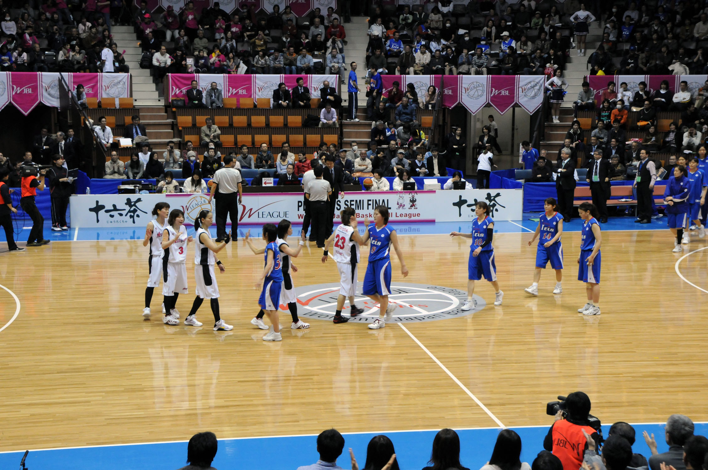 WJBL 10-11プレーオフセミファイナル、トヨタ対デンソー。代々木第二体育館で。